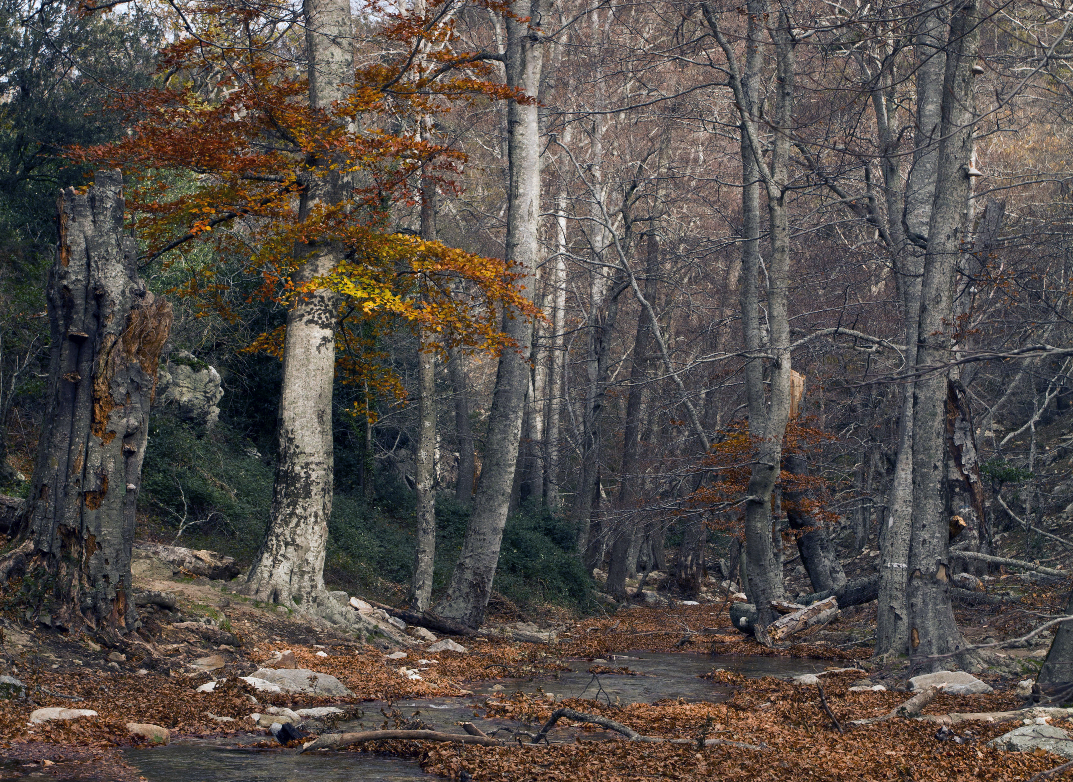 Réserve Naturelle Nationale de la Forêt de la Massane ©Diane Sorel